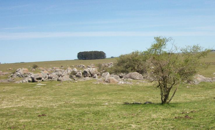 Vista formación rocosa